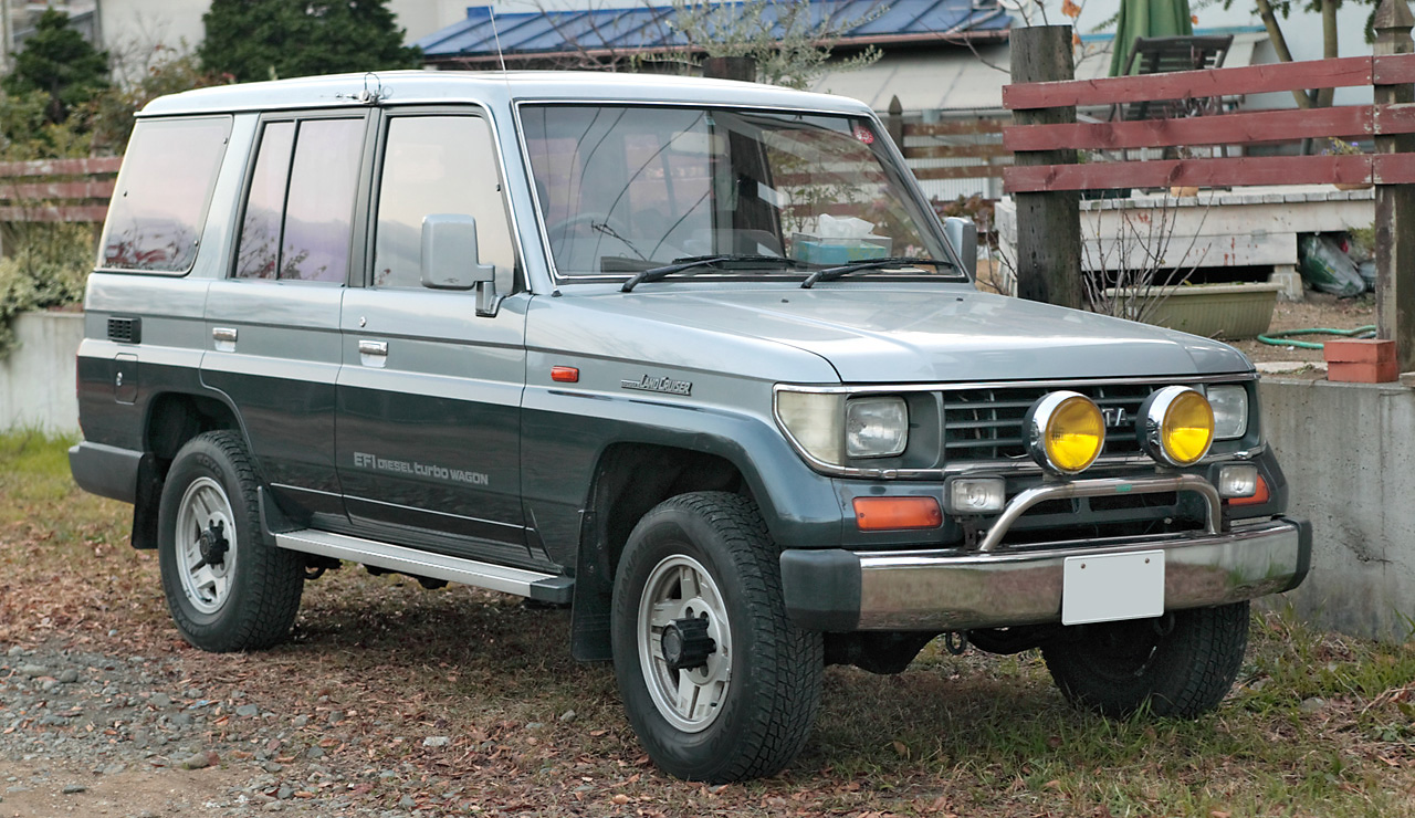 Toyota Land Cruiser Prado Semi long 2.4 Turbo Diesel EX5 ( LJ78G )